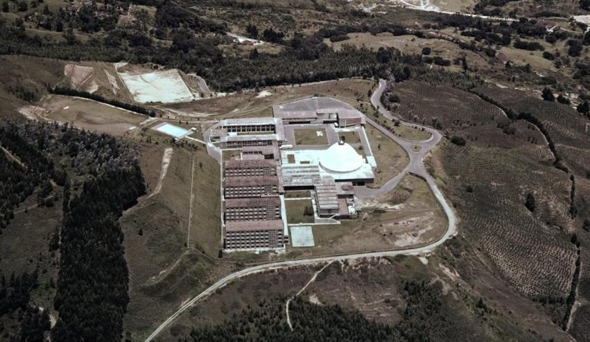 Saminario Mayor de Medellín. Colombia.